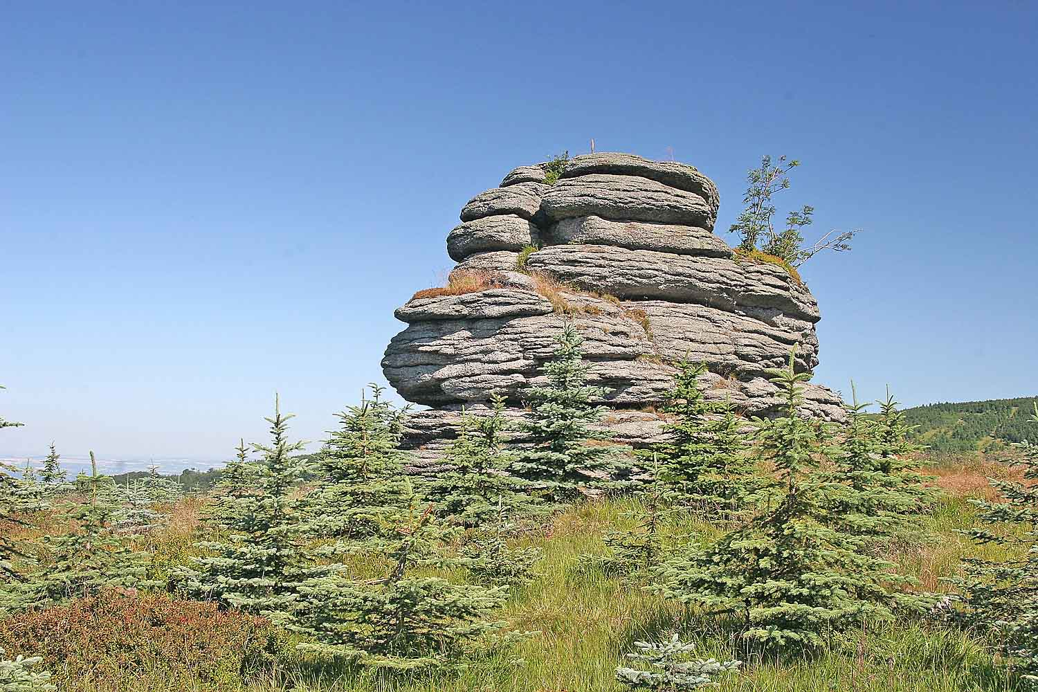 Pytlácká skála 972 m, Jizera Mountains, Czech Republic Autor:Prazak Date: 18. 7. 2006